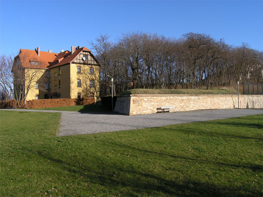 Reste der geschleiften Bastion Gabriel (errichtet zwischen 1676 und 1680) mit der Hornwerkkaserne (errichtet zwischen 1912 und 1913), in der Zitadelle Petersberg in Erfurt